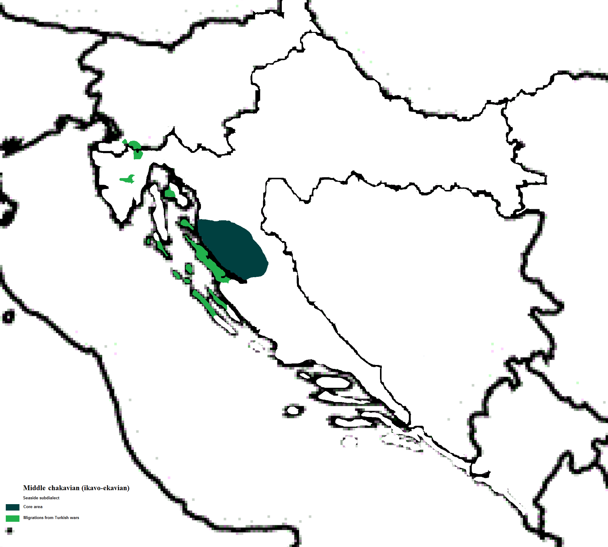 Migracije primorskog poddijalekta srednjočakavskog na otoke Kvarnera i u Istru